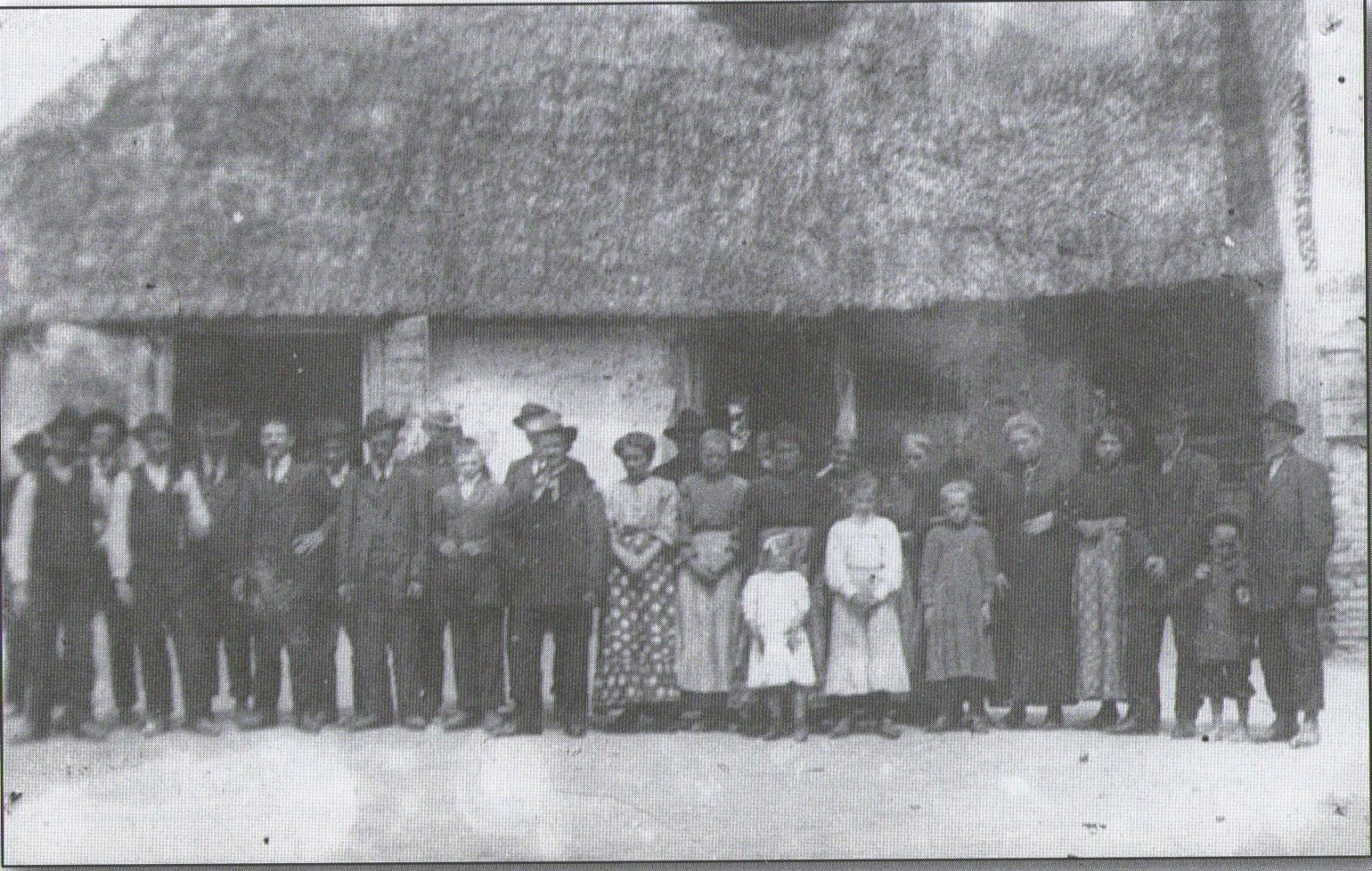 foto di famiglia con sfondo un vecchio casolare di campagna